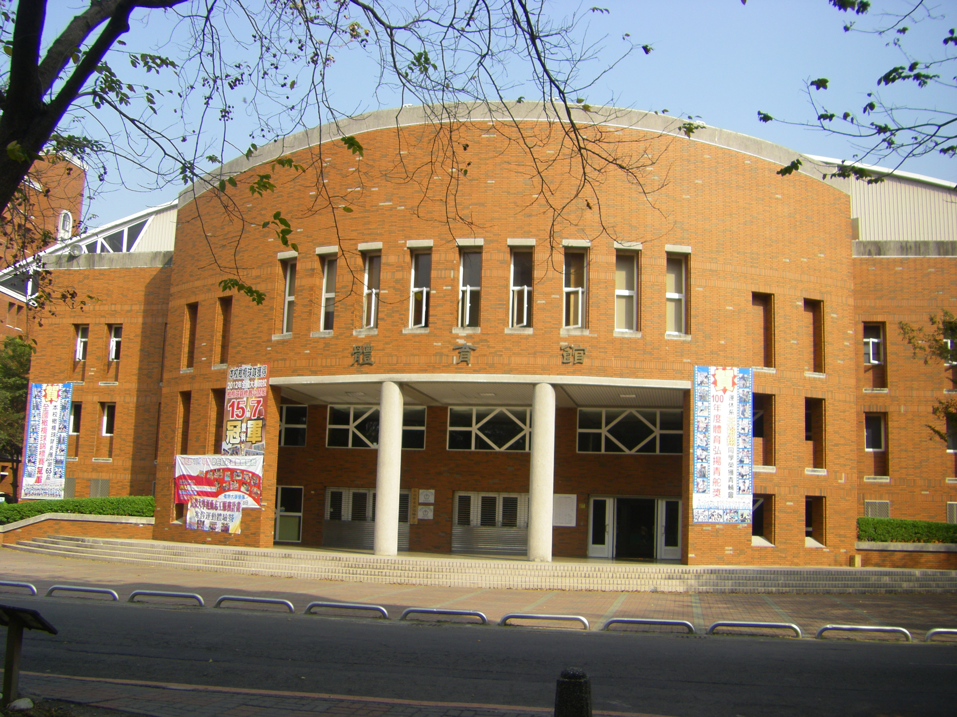 中文（台灣）: 長榮大學綜合體育館